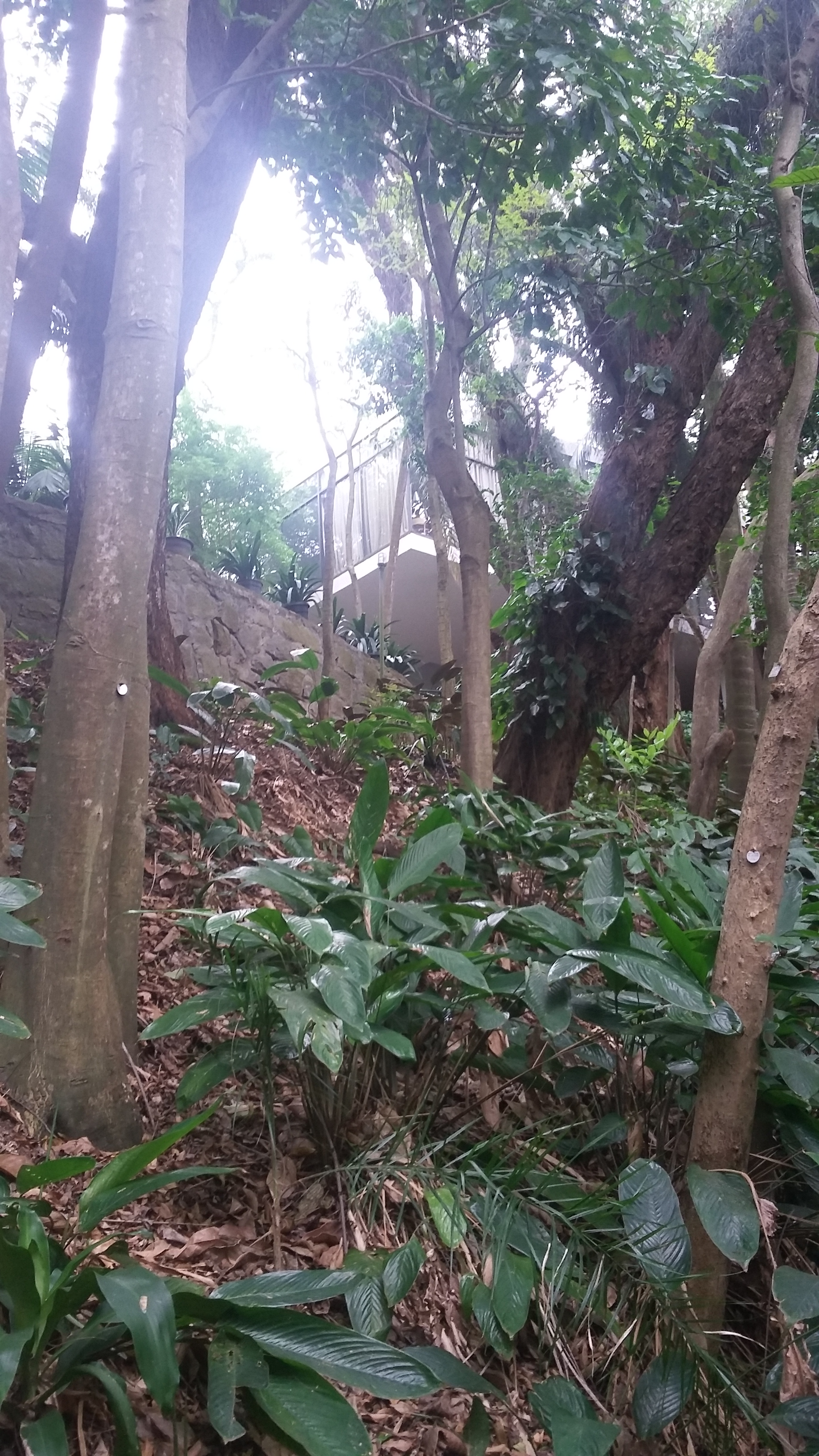 Casa de Vidro e jardim vistos do ateliê.